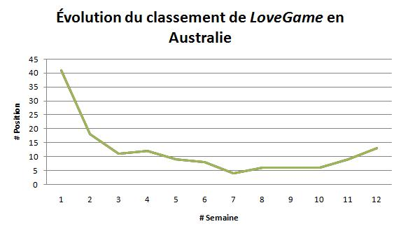 Évolution du classement de LoveGame dans le hit-parade australien.